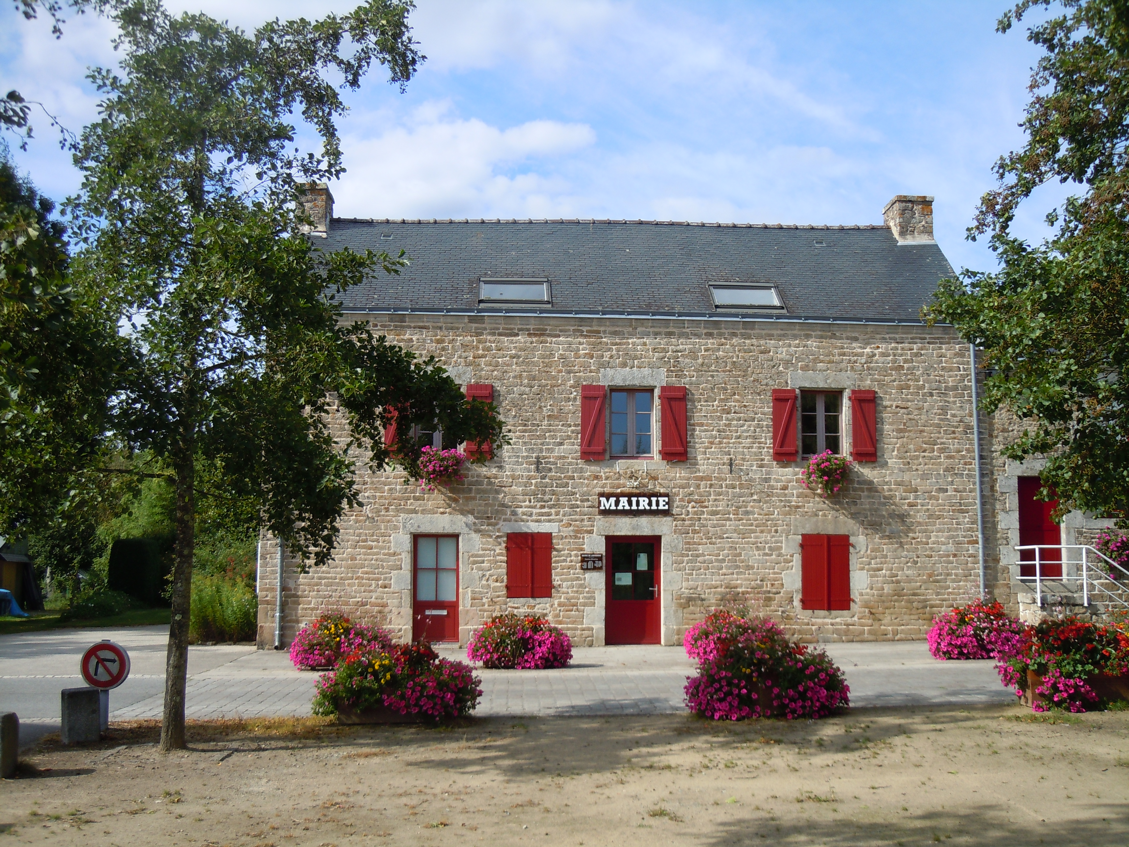 la mairie de Lanvaudan, commune du département du Morbihan